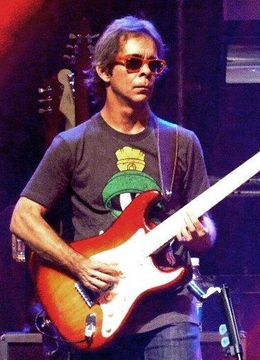 Tim Reynolds tocando con Dave Mathews Band en Santiago de Chile.